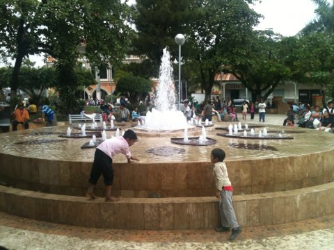 Niños indígenas en la fuente